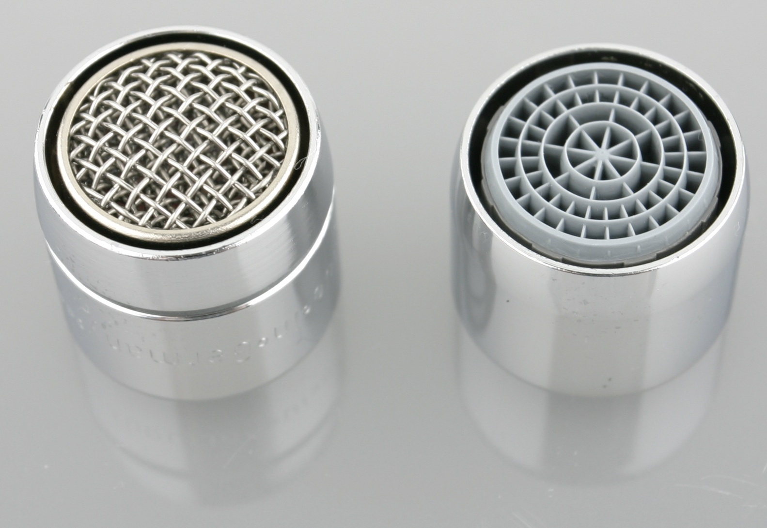 Strahlregler ohne Mengenregler - Außen